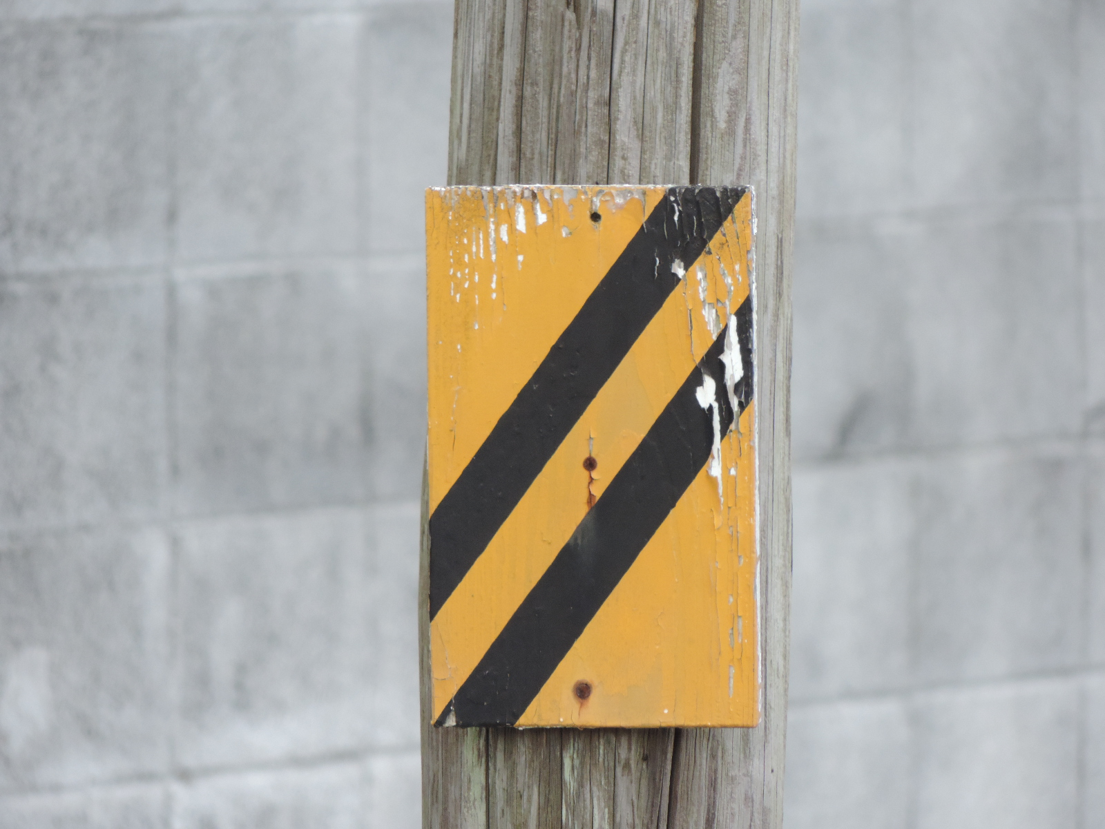 木製の信号警標